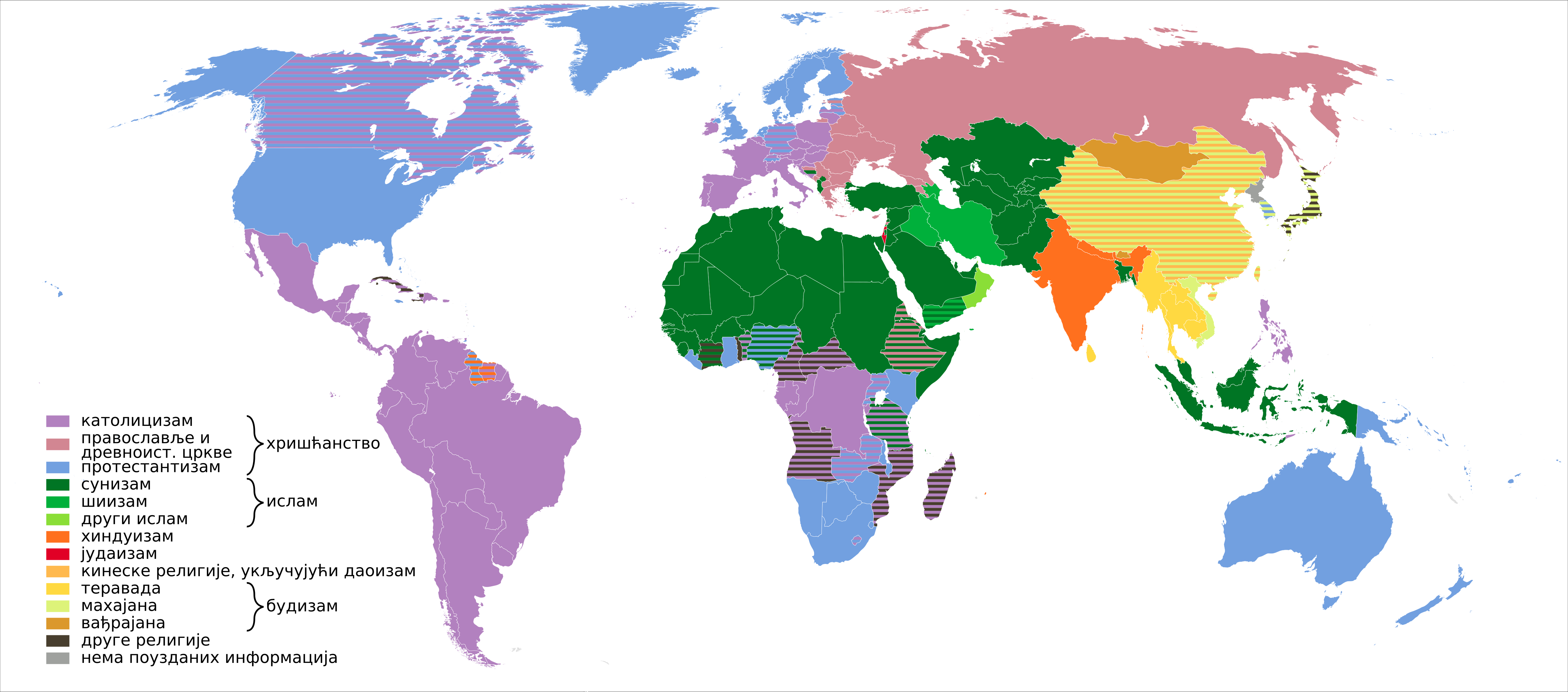 Засновано на слици File:World religions map sr.svg (видети детаљан опис тамо). Изворна верзија преузета са немачке википедије, где је стављено под ГФДЛ-лиценцу и даље на српски прерађено. Тренутна датотека има ГФДЛ CC-by-3.0.